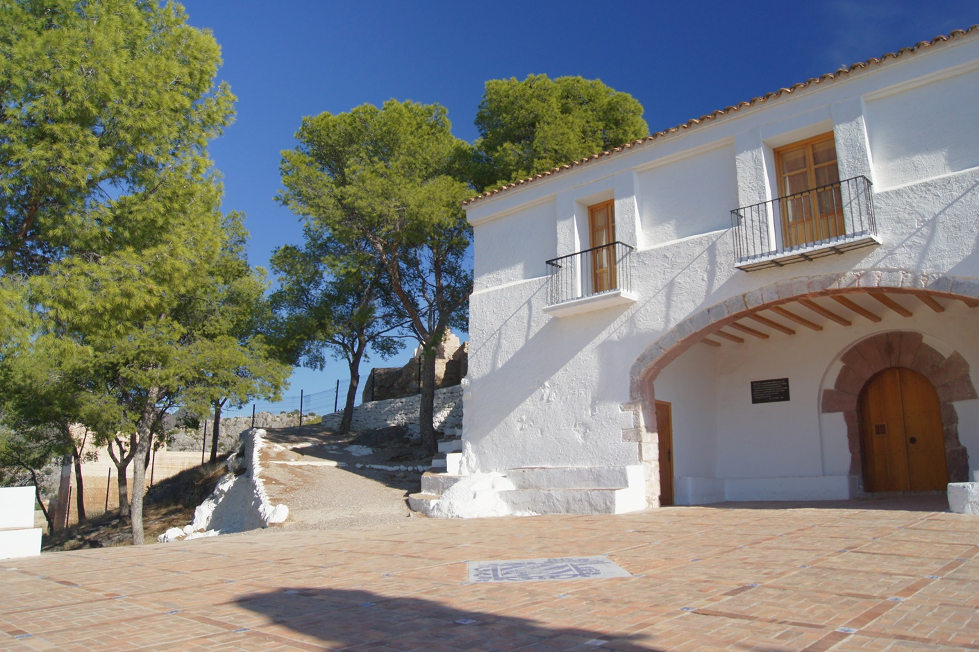 Ermita de la Magadalena. Las ruinas del Castell Vell están al fondo.